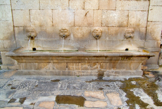 Fontana di piazza Antinora, San Lorenzo Maggiore (BN).